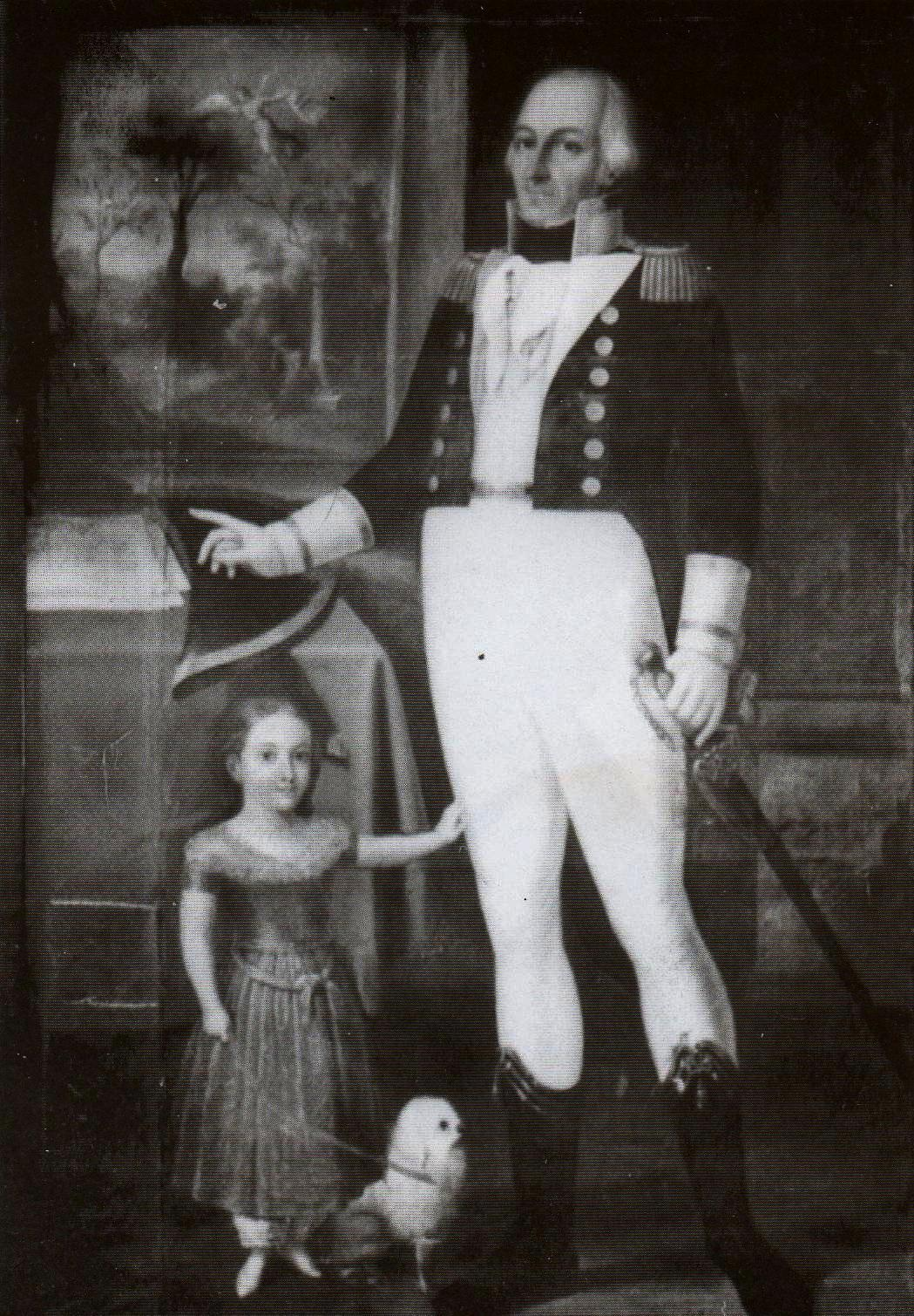 Juan de Salinas y su primogénita, María Dolores Salas de la Vega. Óleo sobre lienzo, Antonio Salas (1802).